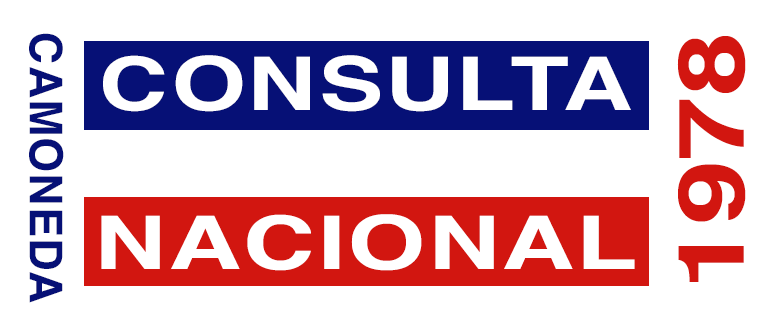 Sello adhesivo utilizado en la Consulta Nacional de Chile de 1978 para marcar las cédulas de identidad de los votantes que ya sufragaron.